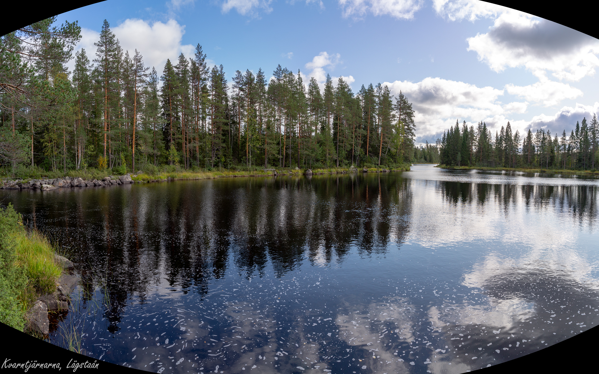 Kvarntjärnarna genomflyts av Lägstaån och ligger 250 meter nedströms Långtjärnsdammet.